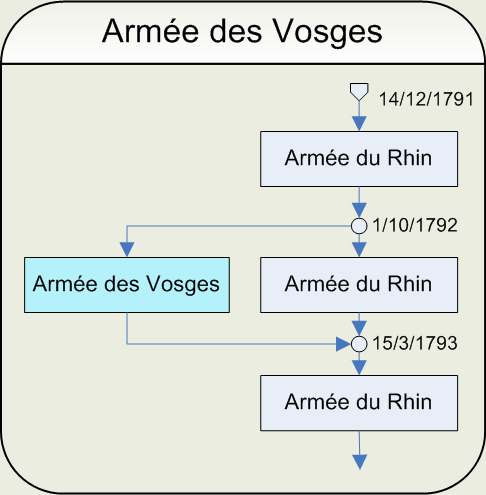 Ordinogramme de l'armée des Vosges Dessin au trait exécuté par Papier K.